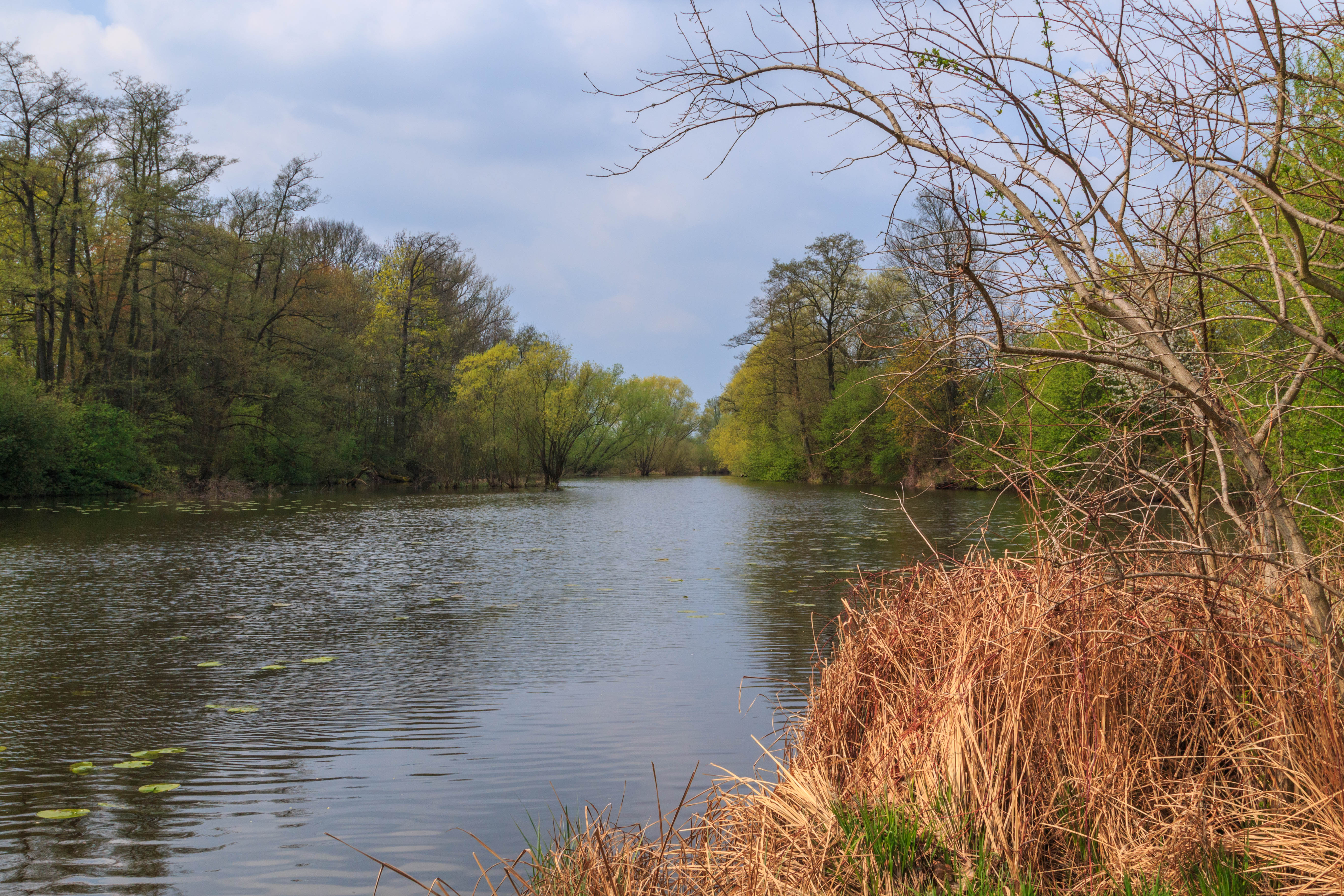 Jesípek - staré rameno Labe u hradce Králové Project: Vodstvo.